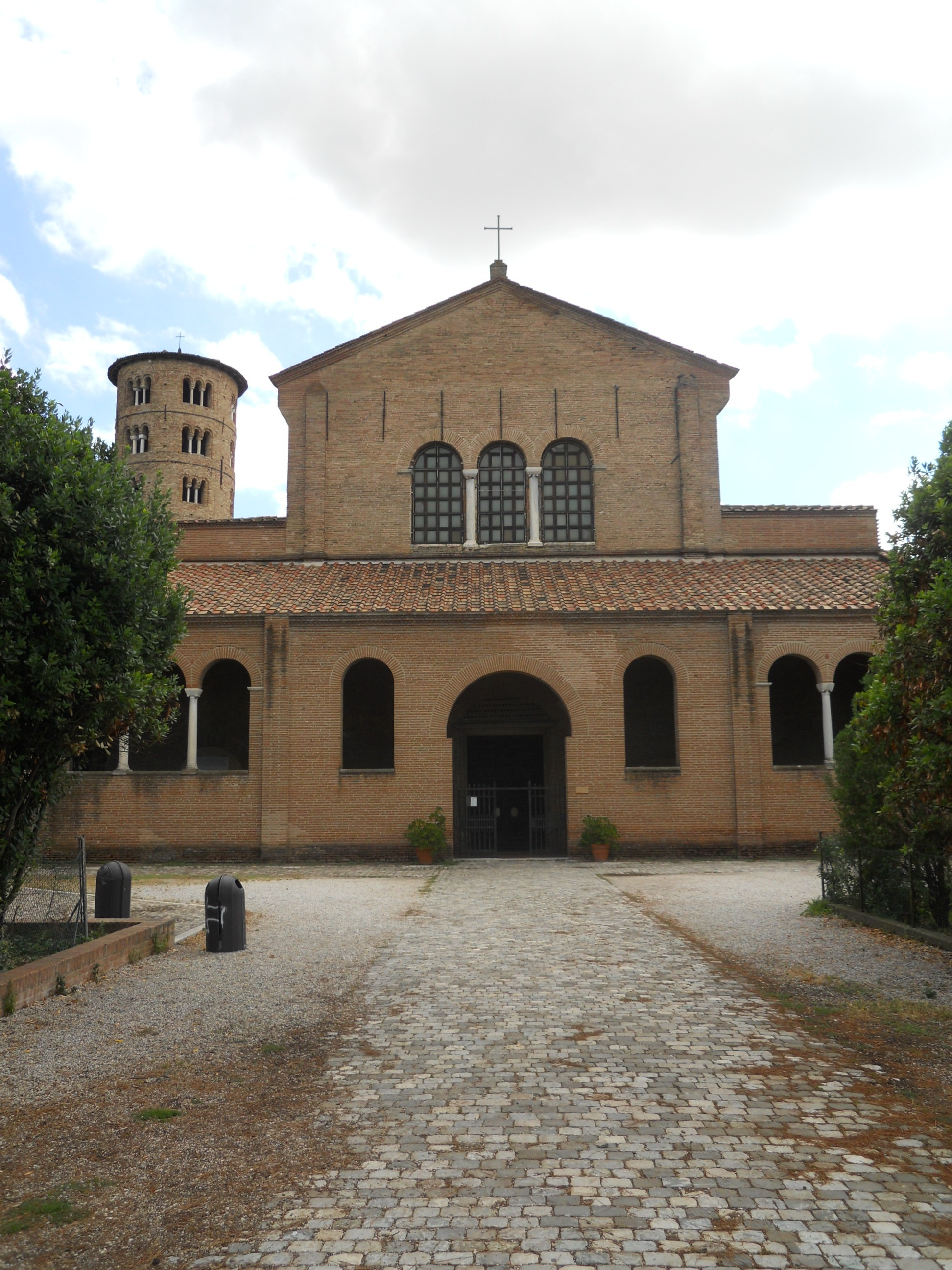 La facciata della Basilica di Sant'Apollinare in Classe, presso Ravenna, con il protiro novecentesco e, sulla sinistra, il campanile circolare.